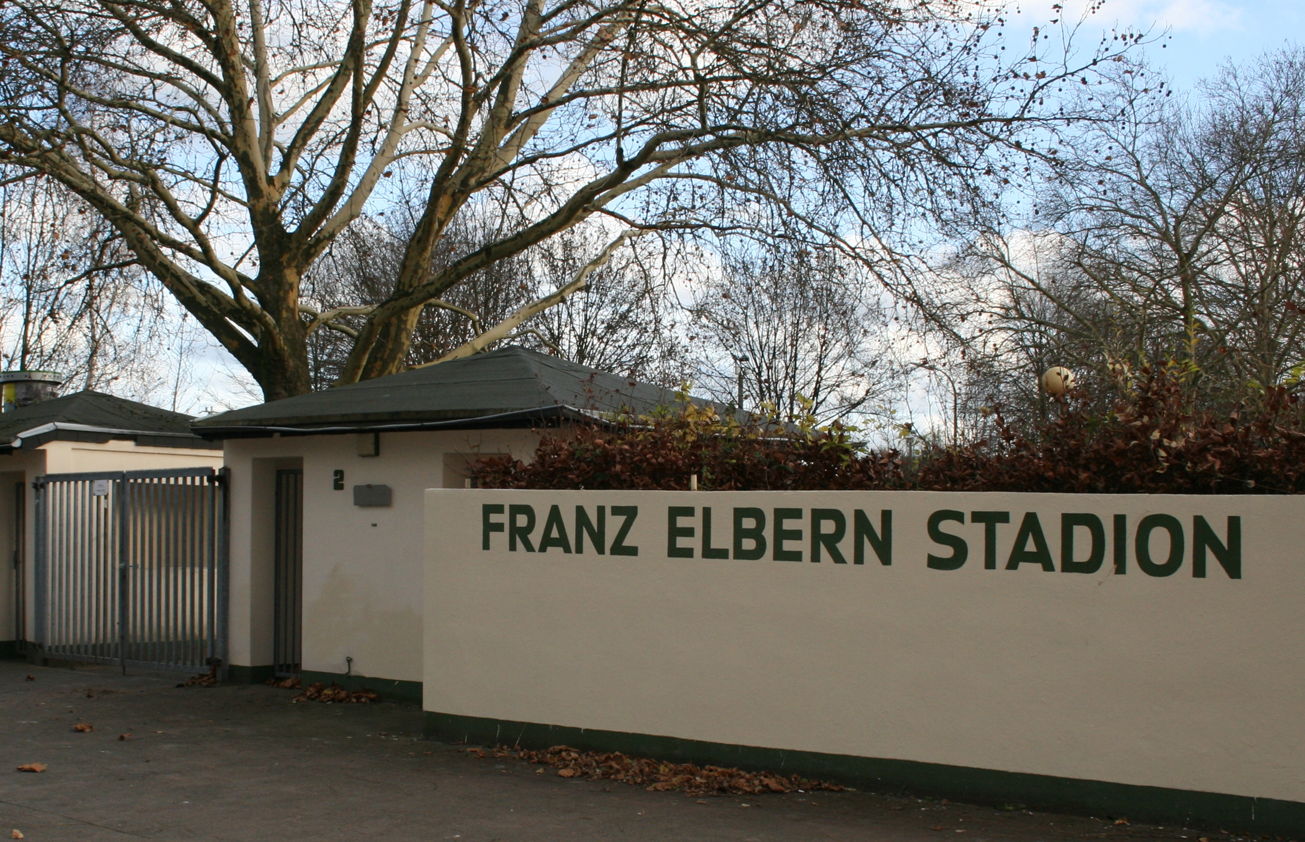 Deutschland, Bonn-Beuel: Eingang zum Fußballstadion; benannt nach dem ehemaligen Nationalspieler Franz Elbern (1910-2002); Heimstätte des SV Beuel 06.